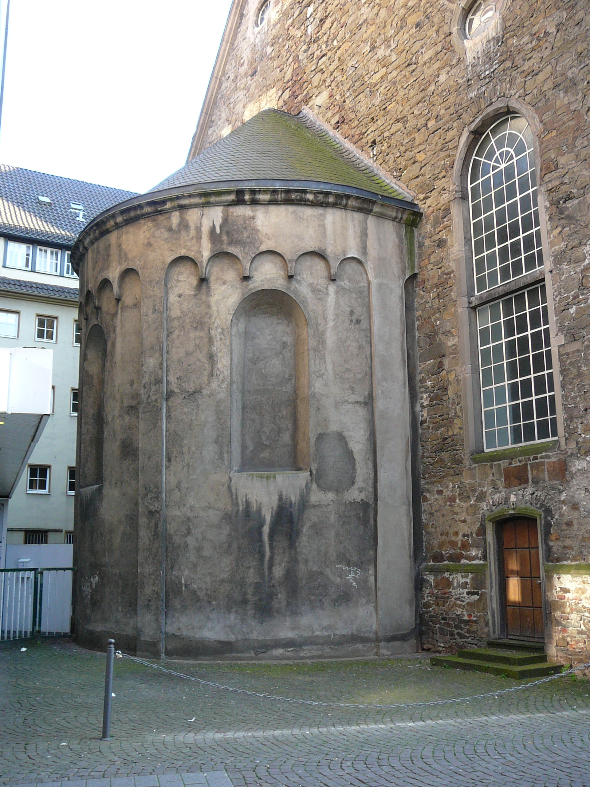 Kirchplatz, Wuppertal